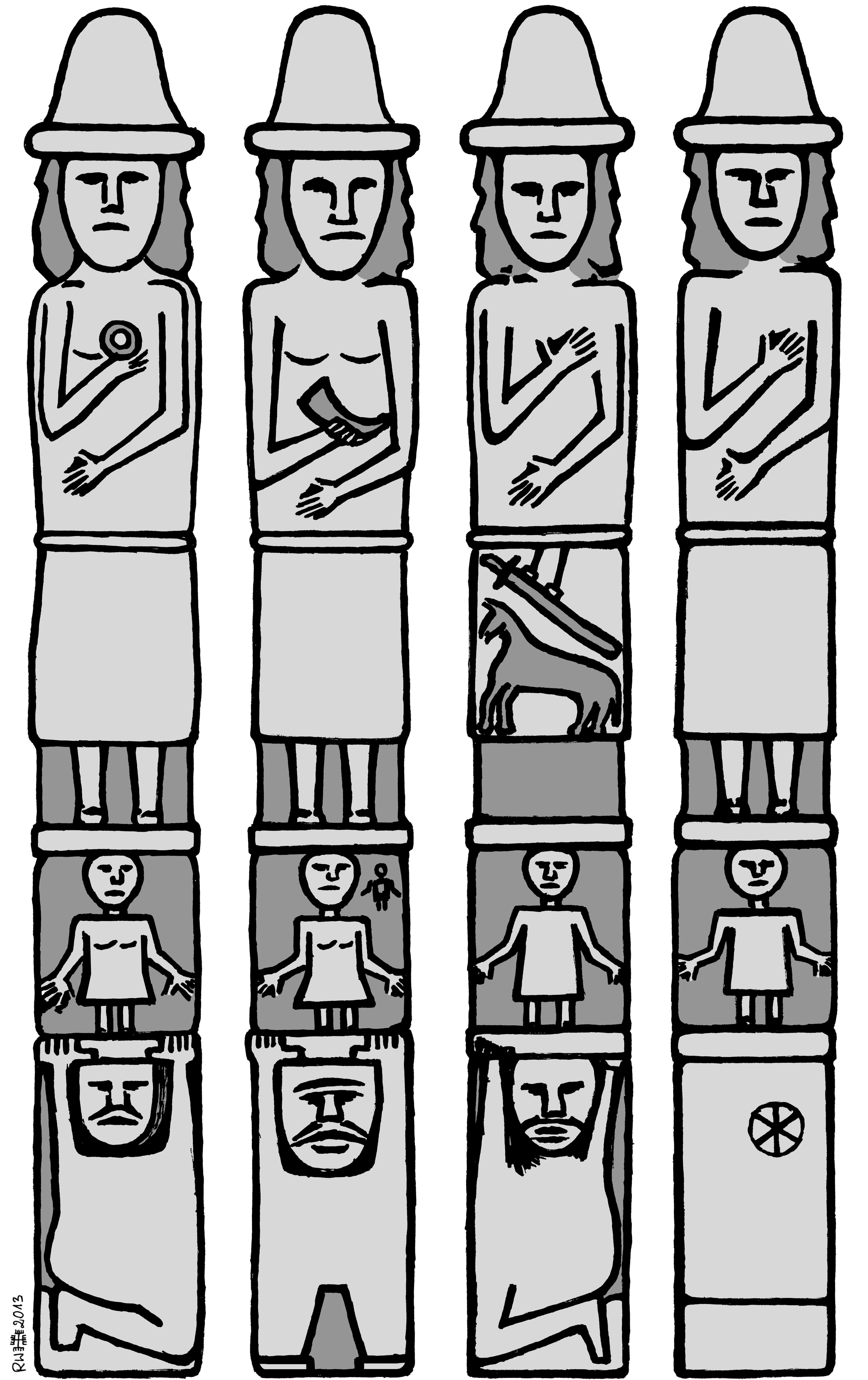 Przedstawienie płaskorzeźb zdobiących poszczególne strony posągu ze Zbrucza. Ryc. Ratomir Wilkowski - "Rodzimy Kościół